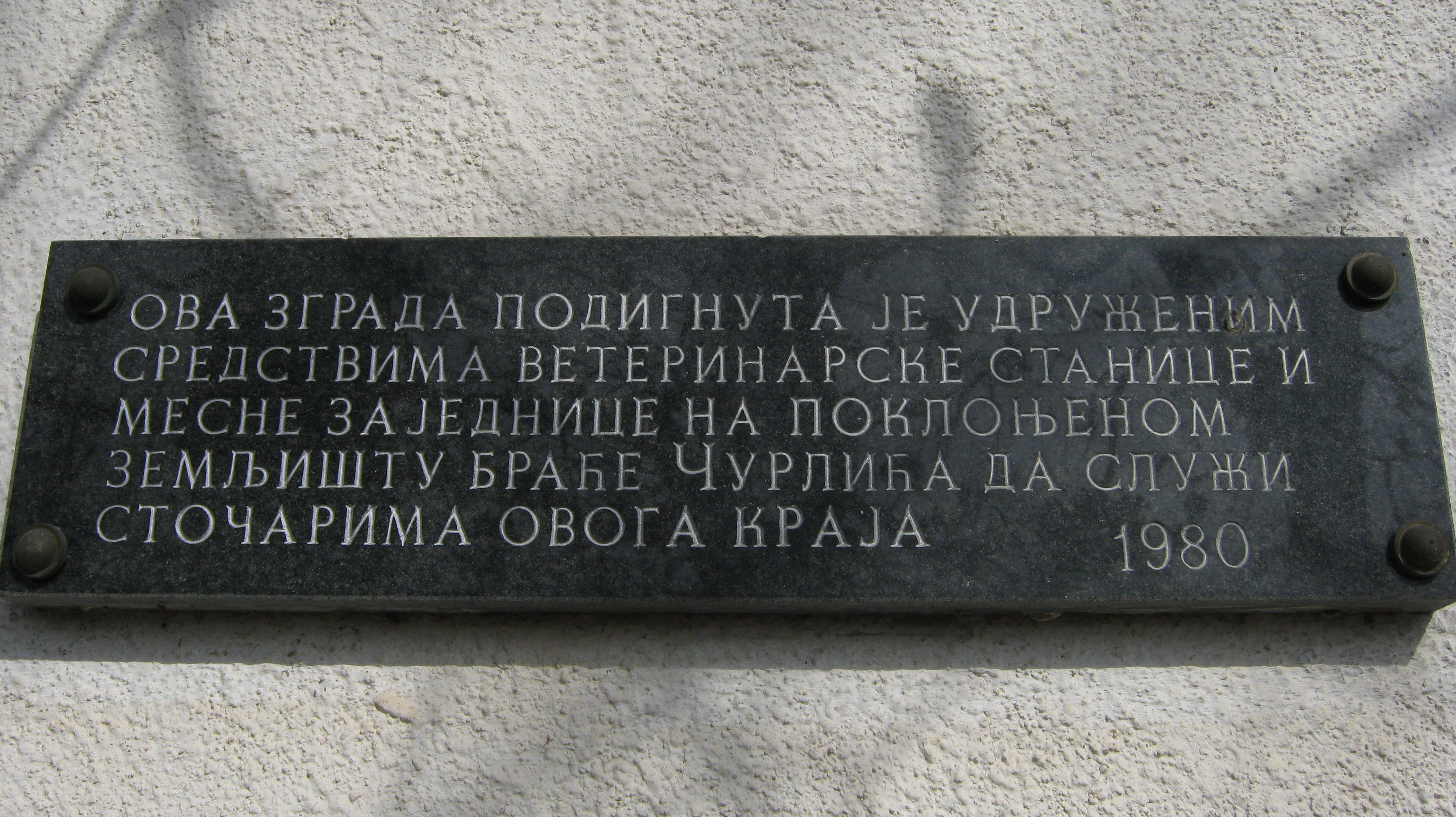 У циљу заштите сточног фонда, становници Шарана и Дренове су заједничким средствима саградили зграду ветеринарске амбуланте између два села, на локацији Маџарско гробље, која је од 1980. радила као испостава милановачке ветеринарске станице. Ова зграда одражавала је спремност локалног становништва да се удруже и раде у добробит свих сељака. Ветеринарска амбуланта затворена је почетком 21. века због све мањег броја домаћинстава која се баве сточарством. На слици се види последица немара и дивљаштва појединаца.